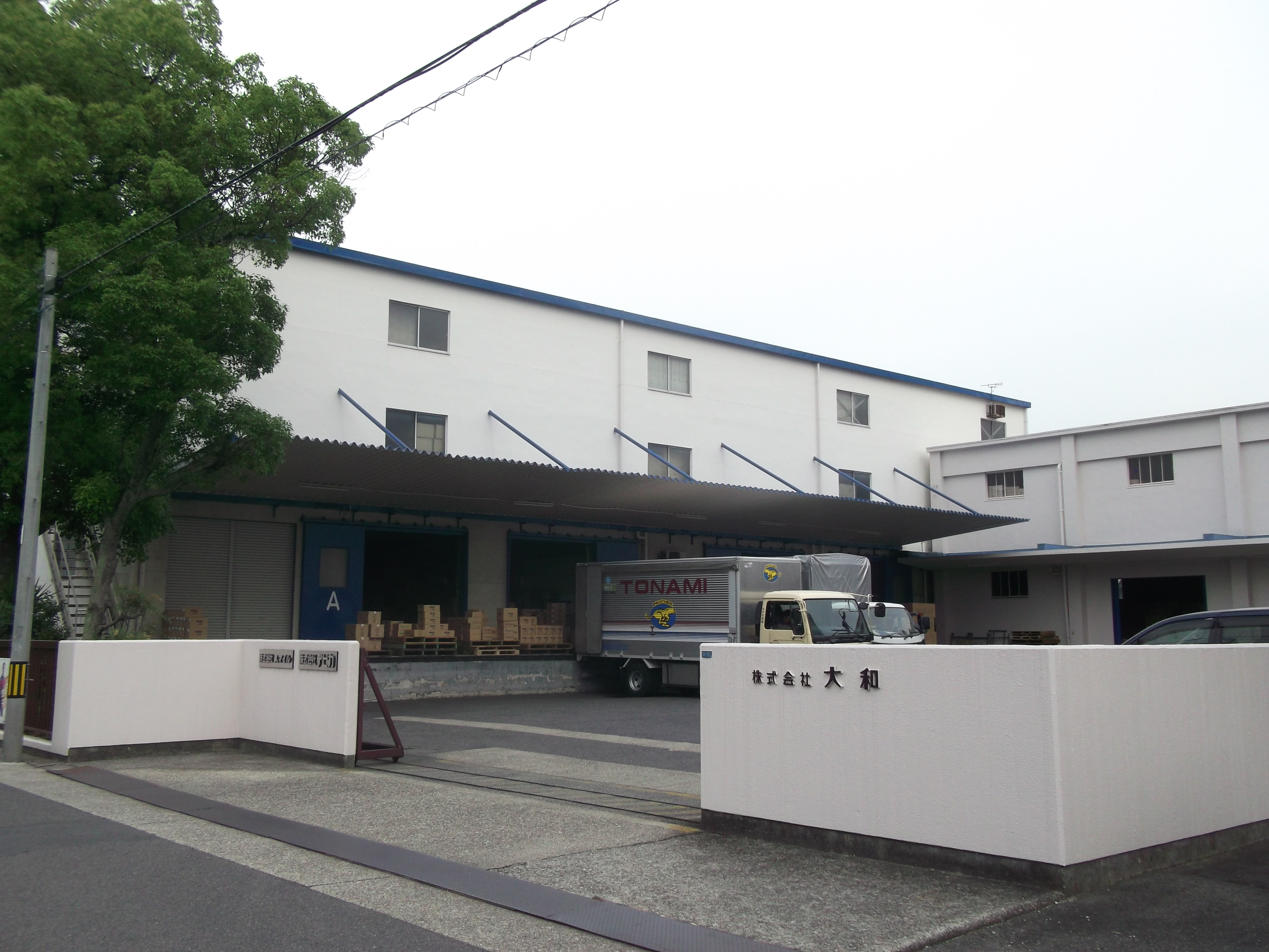 名古屋市守山区小六町のデビカ本社を北側公道西側より撮影